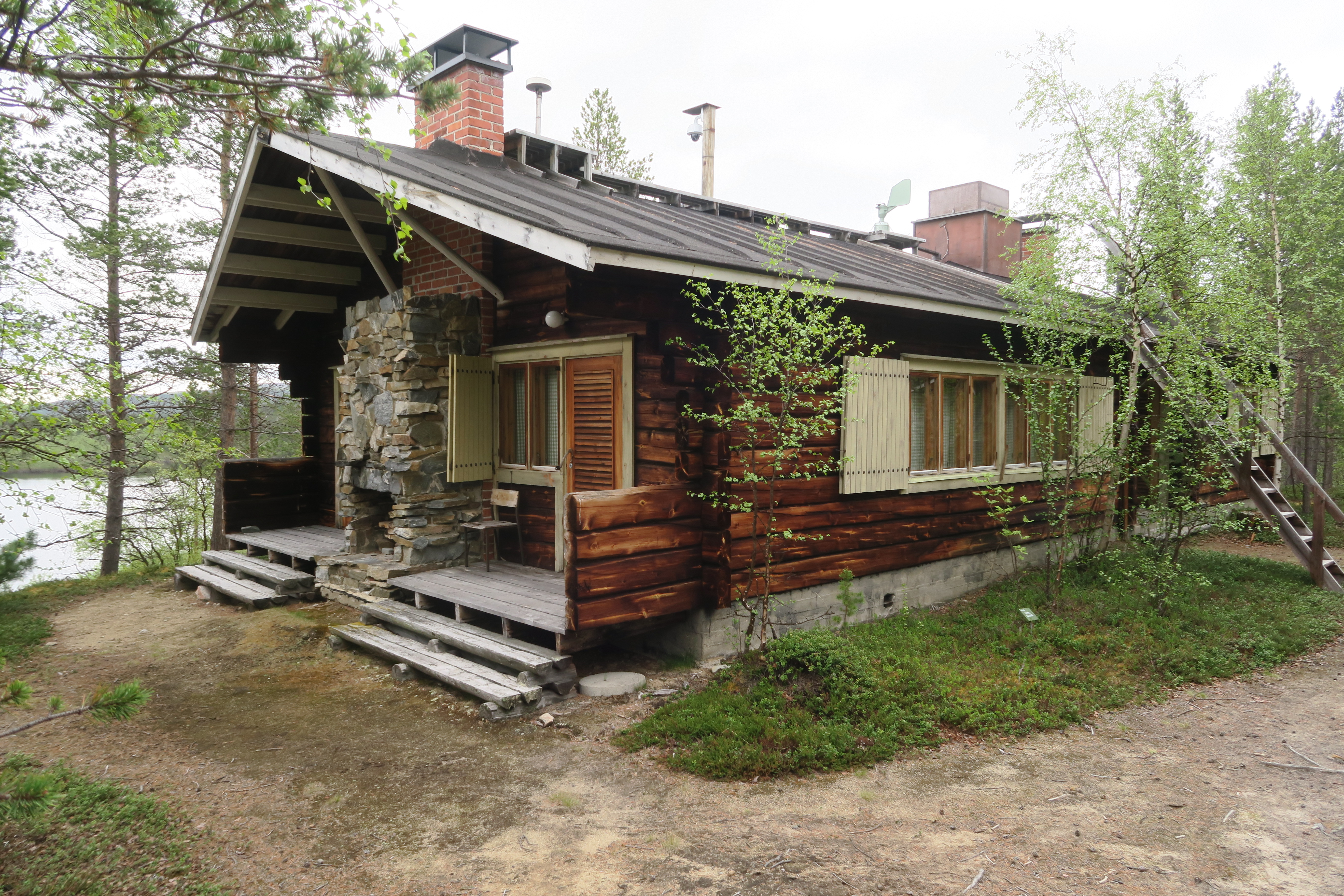 Turun yliopisto, Lapin tutkimuslaitos Kevo, asuinrakennus Pekola, aseman ensimmäinen päärakennus